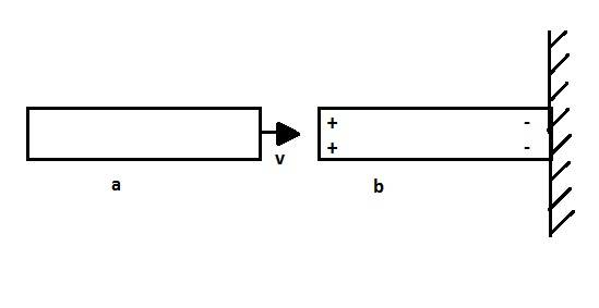 Brīvo elektronu inerciālā kustība